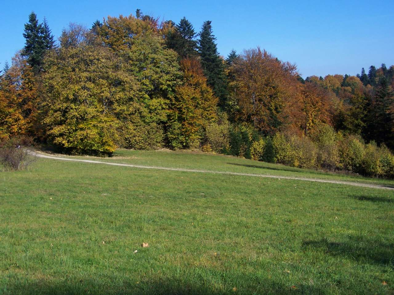 Polana Wyrobek (Pieniny)